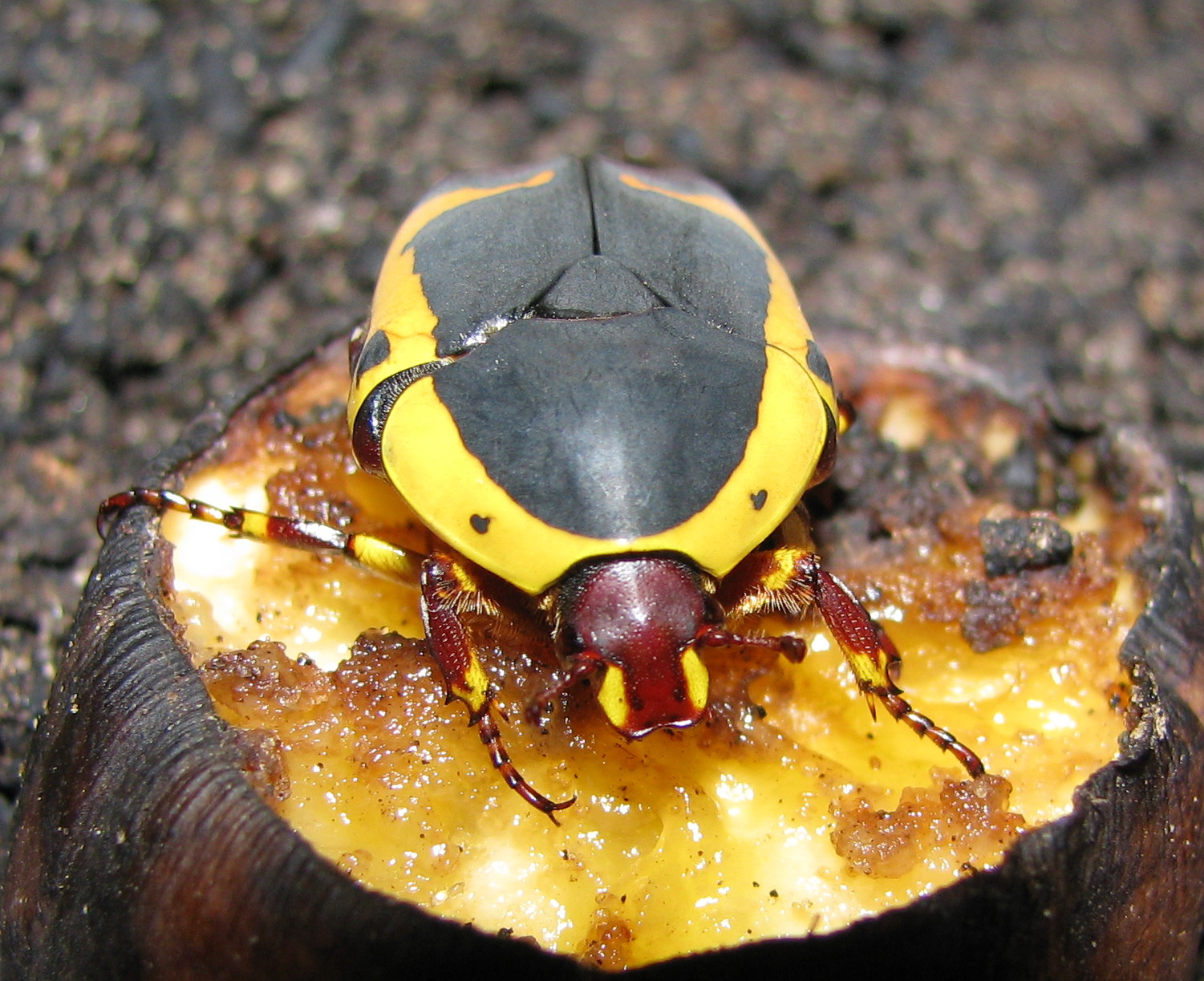 Pachnoda sinuata flaviventris, Portrait